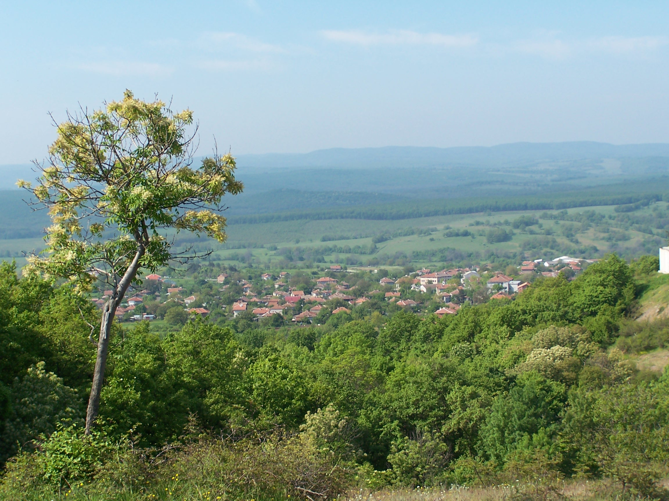 Село Веселие, поглед от Мара Лишанка